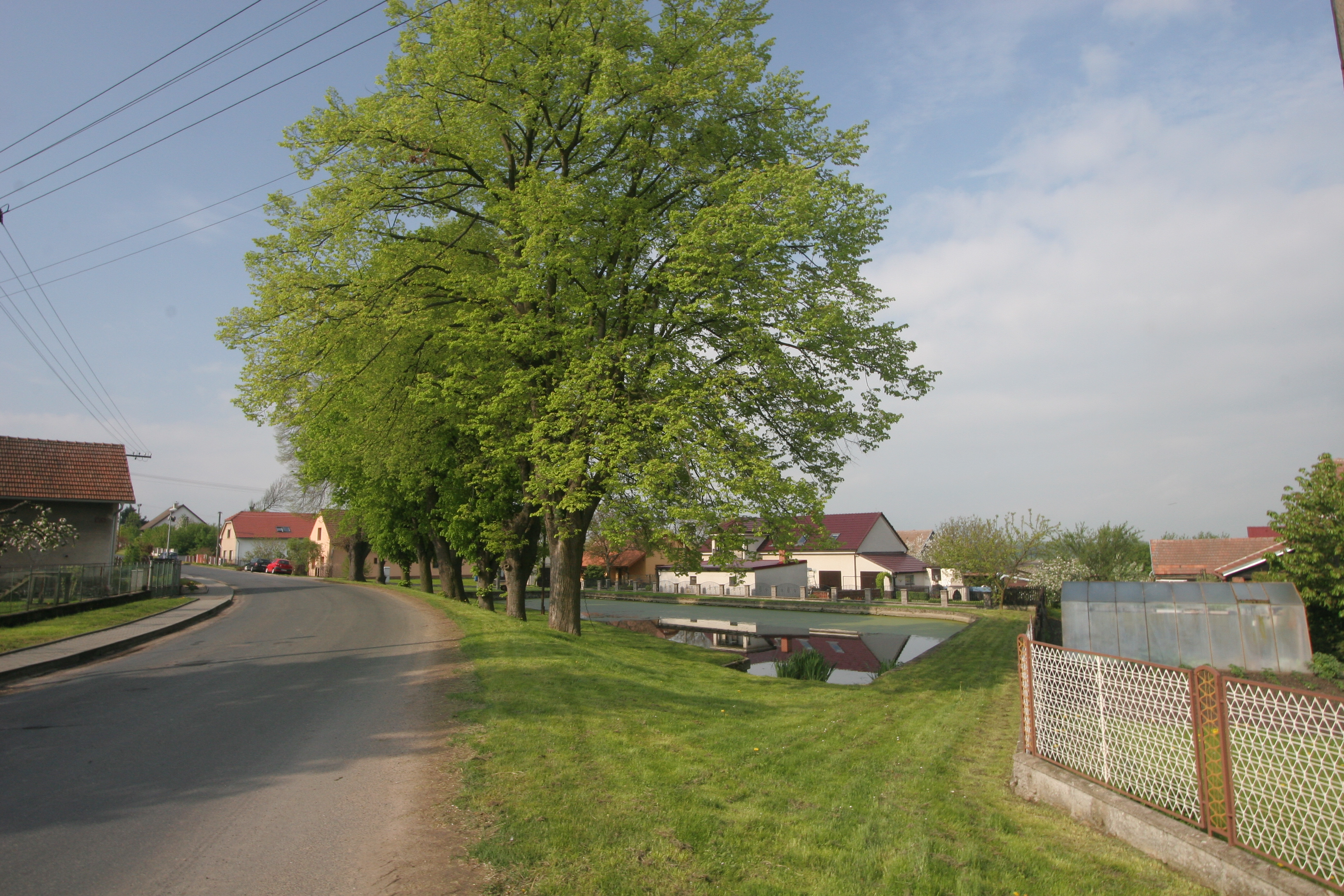 Chýšť návesní rybníček